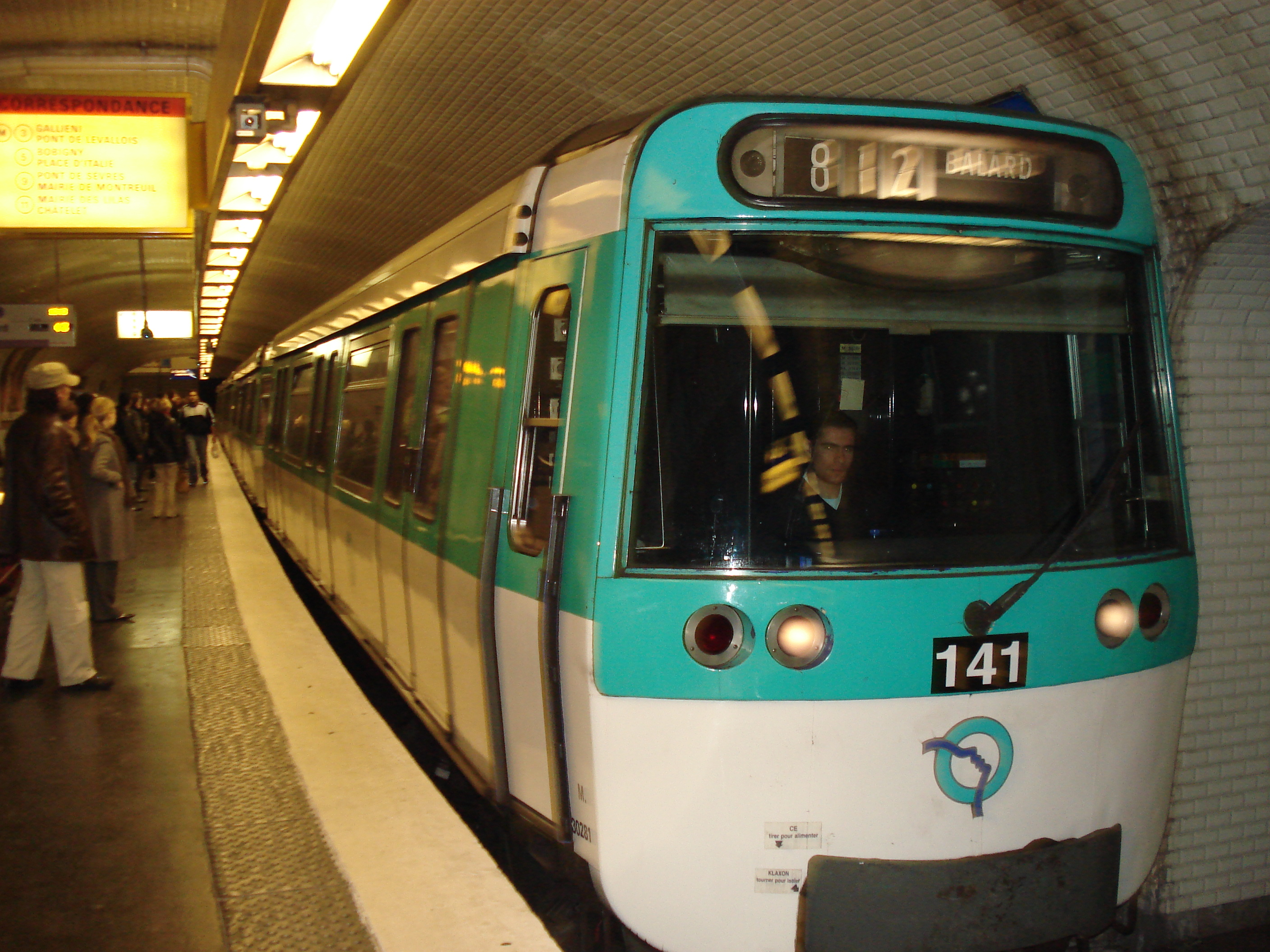 Métro de Paris Rame de la serie MF77 sur la ligne 8 a la station République Lieu : Paris, France Date : Mars 2007 Auteur : Brio photo personnelle